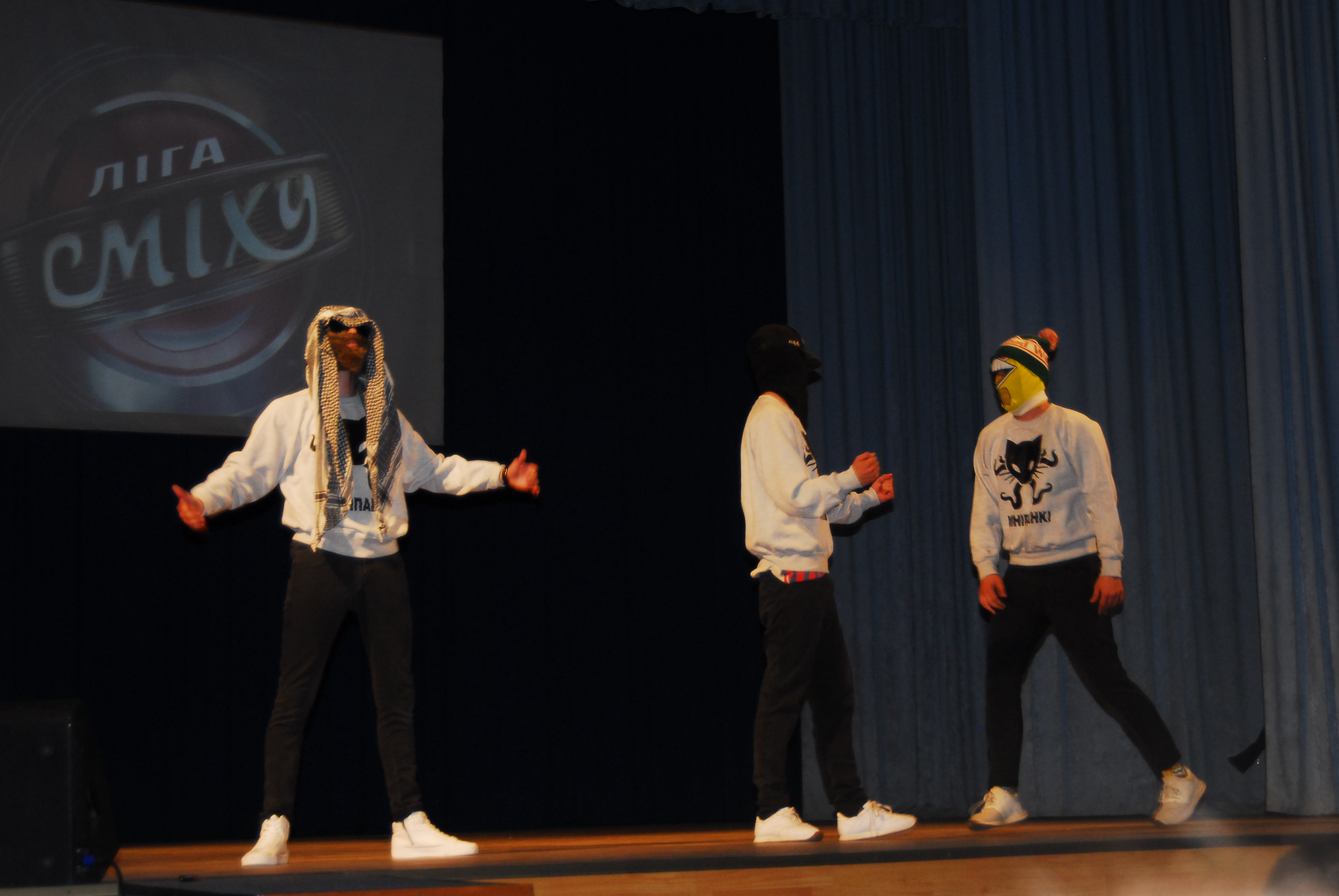 Мелитополь